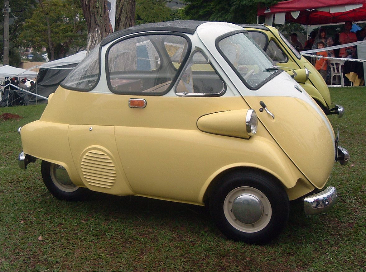 Brazilian Romi-Isetta